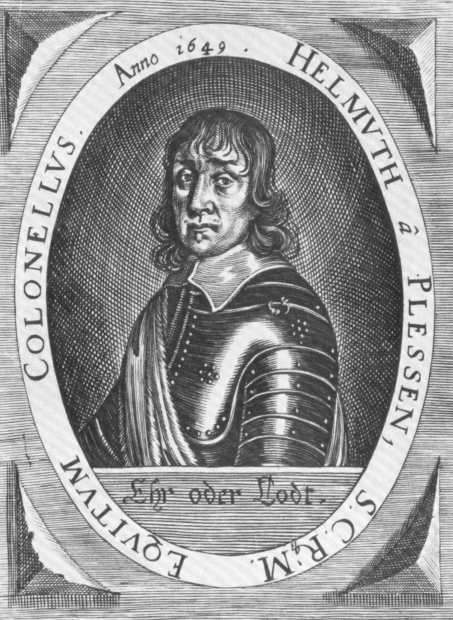 Beschreibung: Oberst Helmuth von Plessen Datum: 1649 Quelle: Abfotografie aus dem Buch "Die Plessen", C.A. Starke Verlag, Limburg Urheber: unbekannter spätmittelalterlicher Zeichner